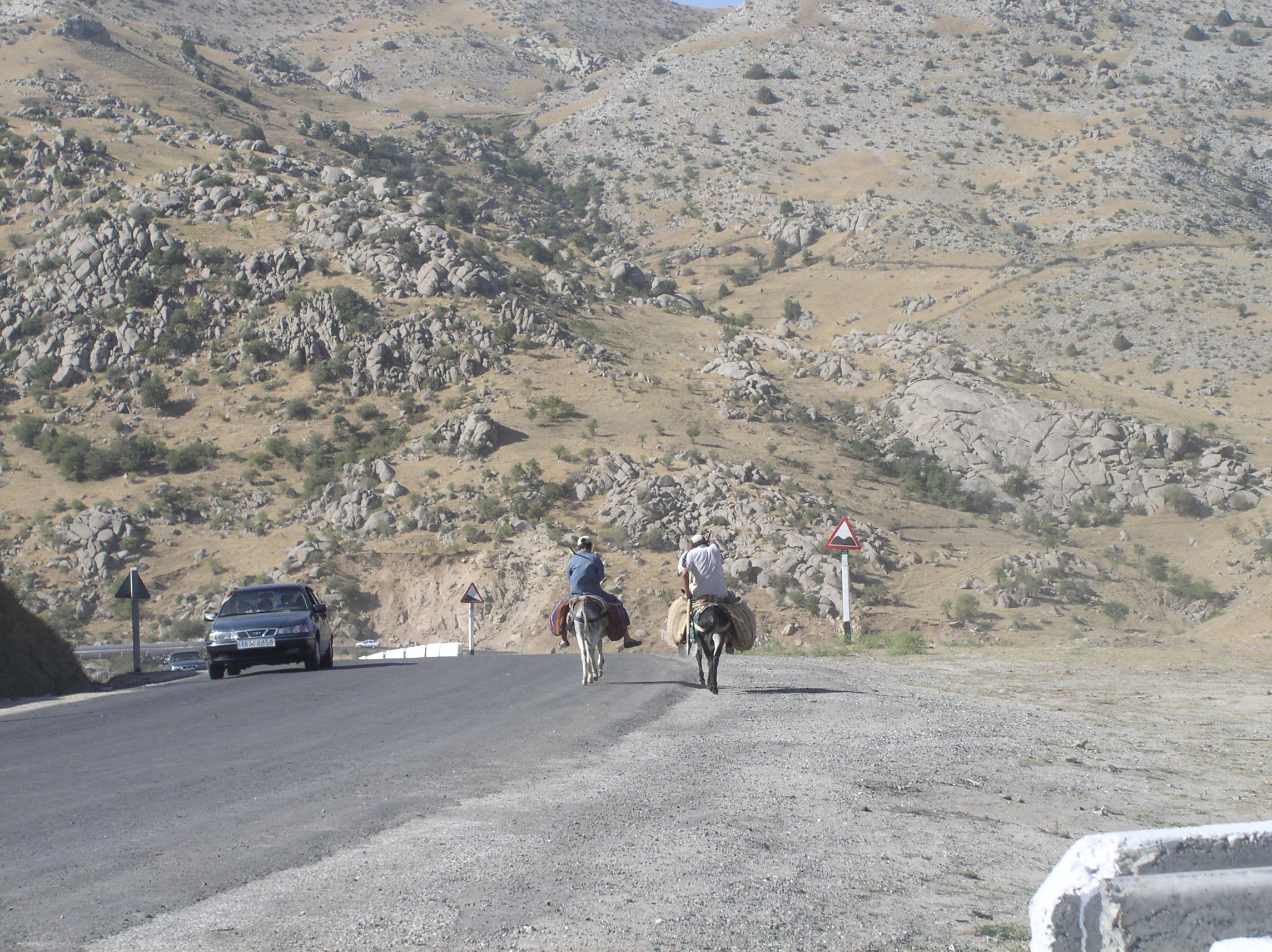 Road between Samarkand and Shahrisabz (Uzbekistan).